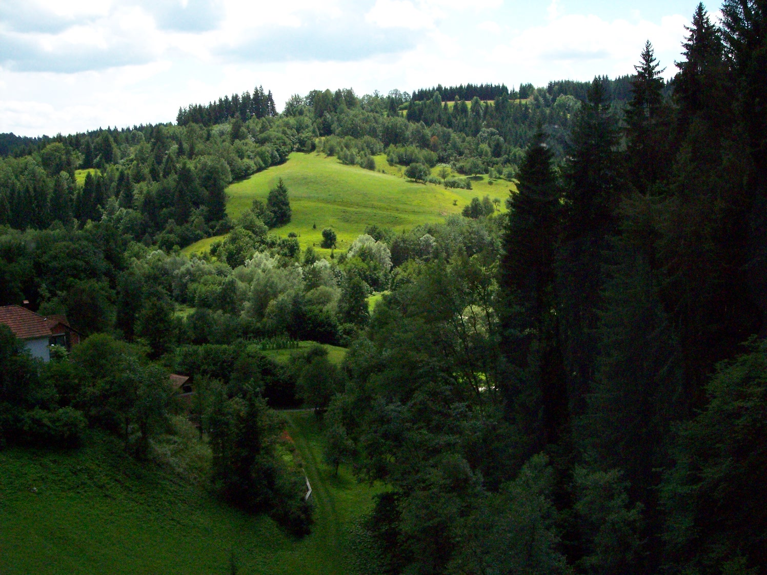 Predjama Castle in Slovenia (near Postojna).